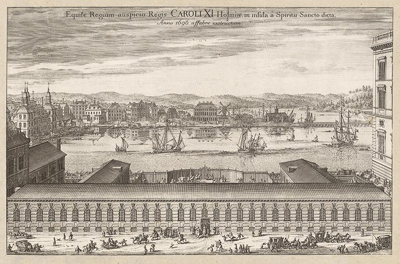 Equile Regium auspicio Regis Caroli XI Holmiae, in insula a Spiritu Sanctu dicta Anno 1696 affabre exstructum : [Bild] / [Johannes van den Aveelen]